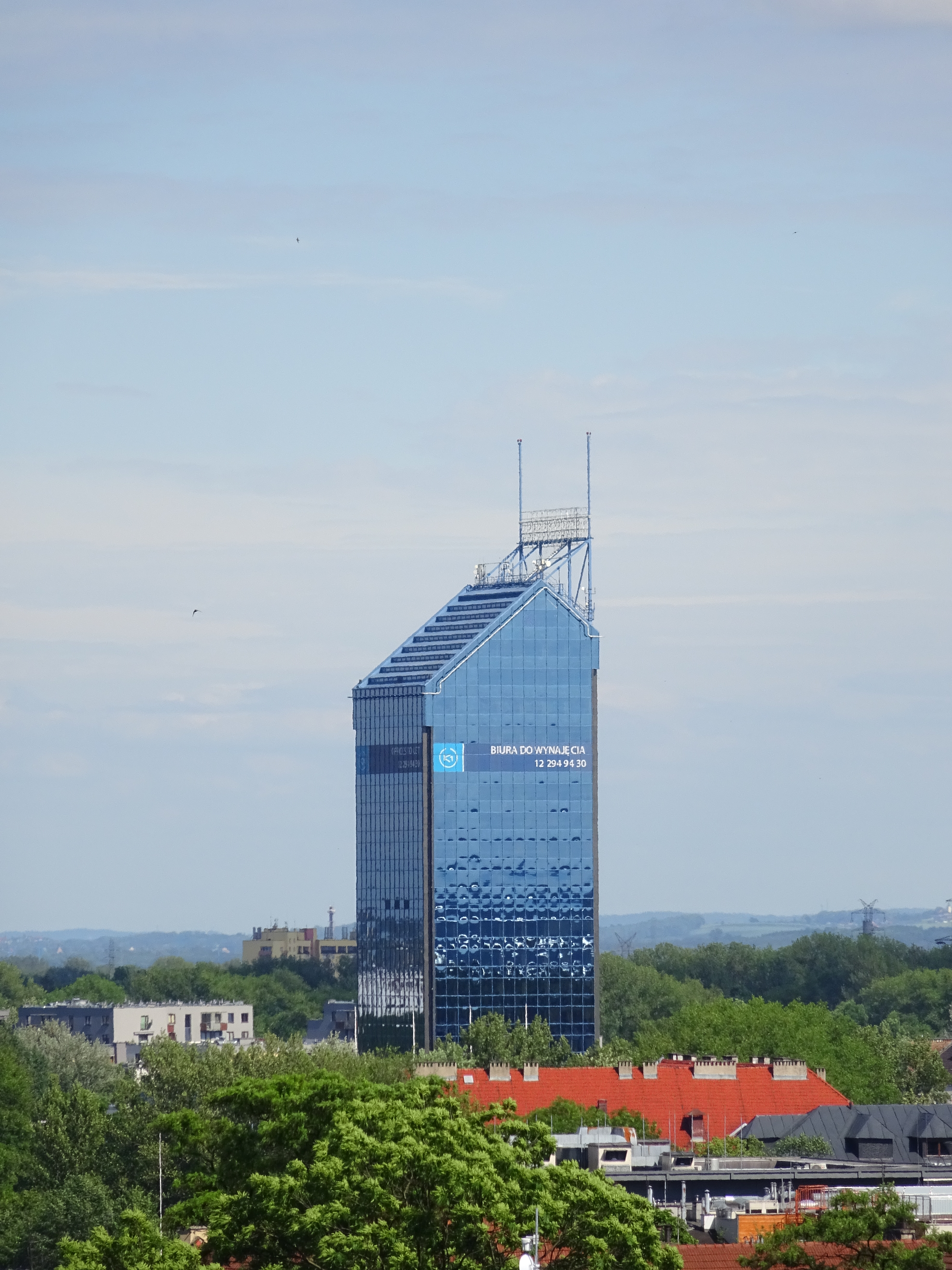 Wieżowiec K1 (Błękitek) w Krakowie. Widok od strony północno-zachodniej, z dachu Akademii Muzycznej. 2017